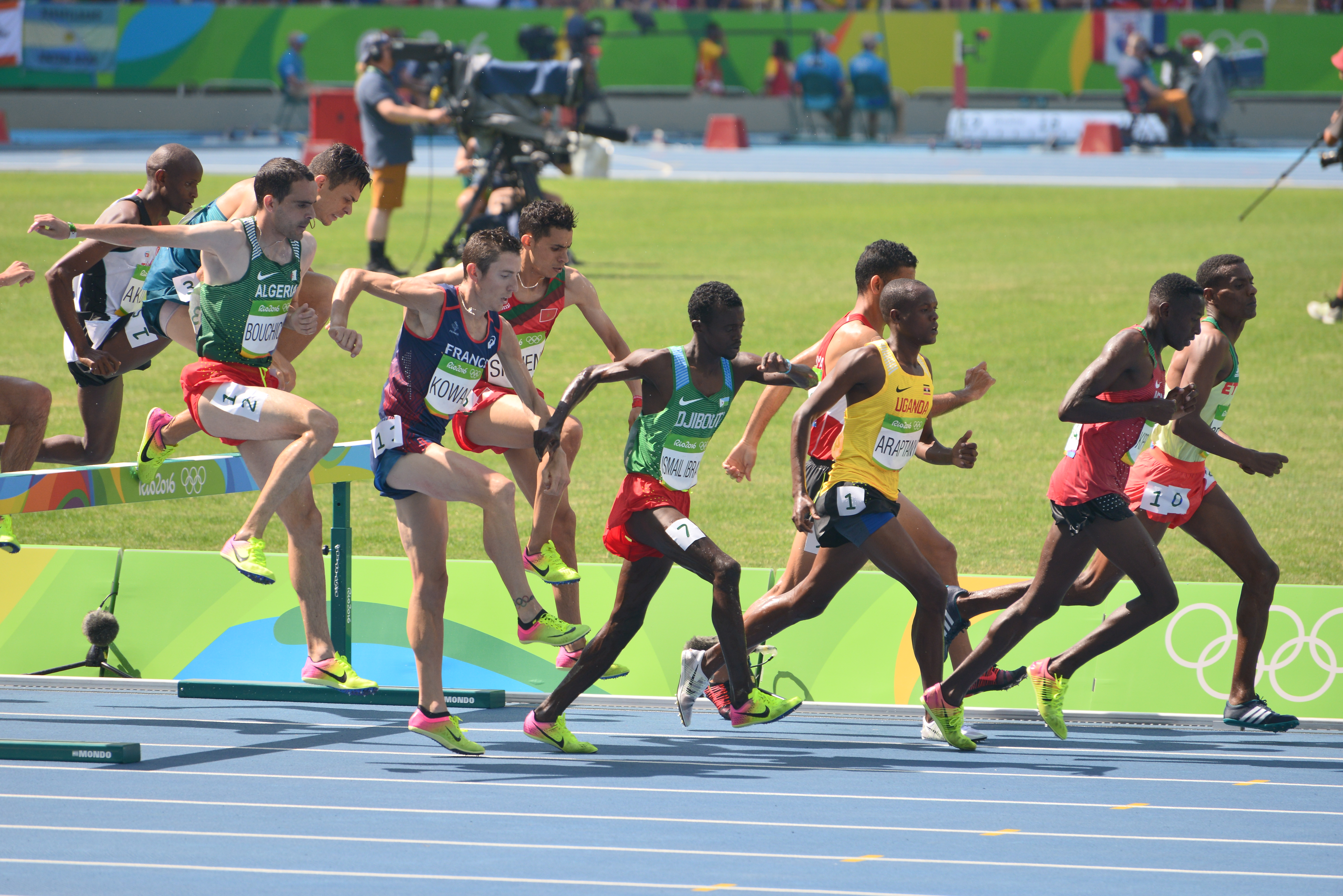 Série du 3000m steeple Homme des JO de Rio, 2016